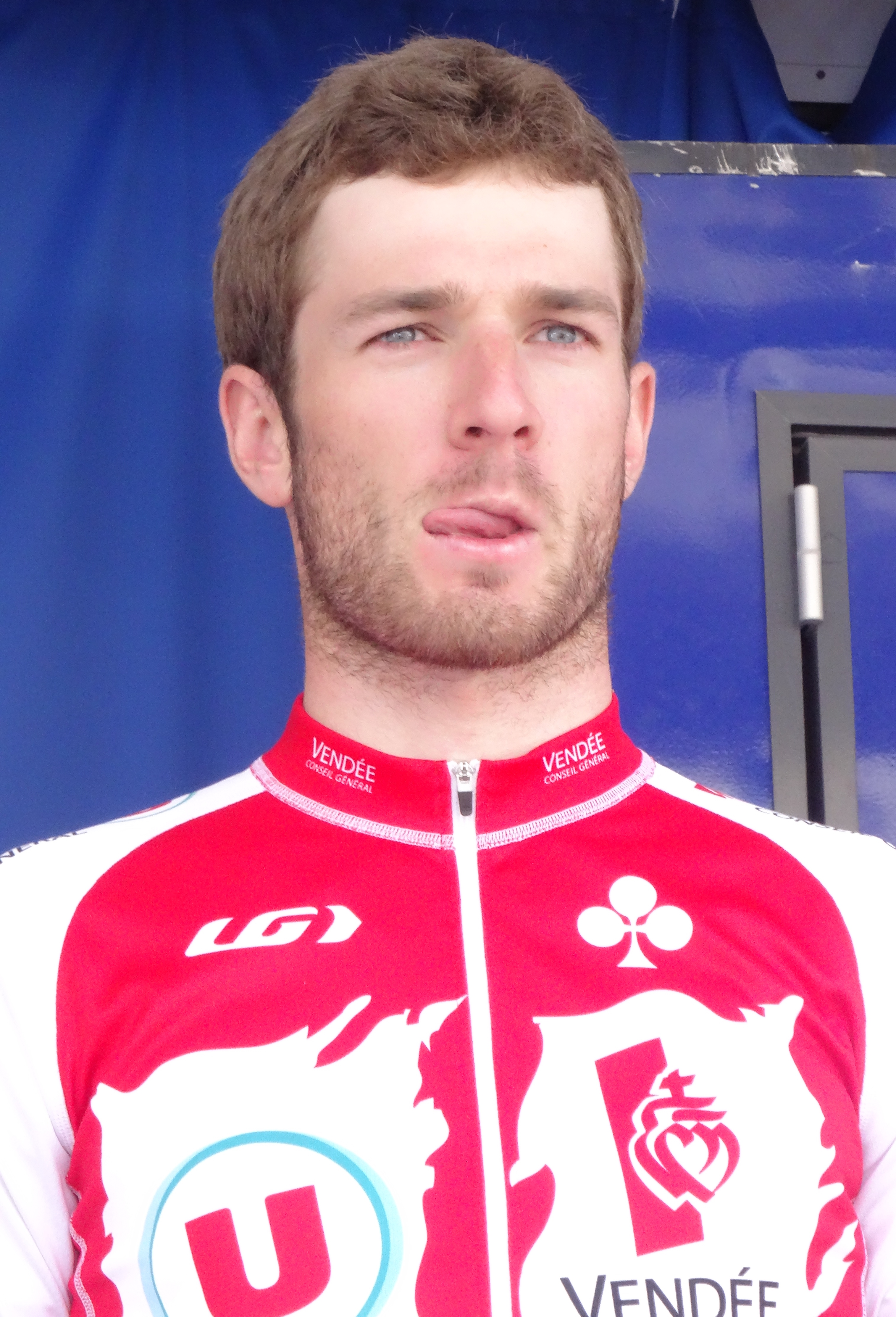 Reportage photographique réalisé le dimanche 25 mai 2014 à l'occasion du départ et de l'arrivée de la troisième étape du Paris-Arras Tour 2014 à Arras, Pas-de-Calais, Nord-Pas-de-Calais, France. Depicted person: Jérémy Cornu